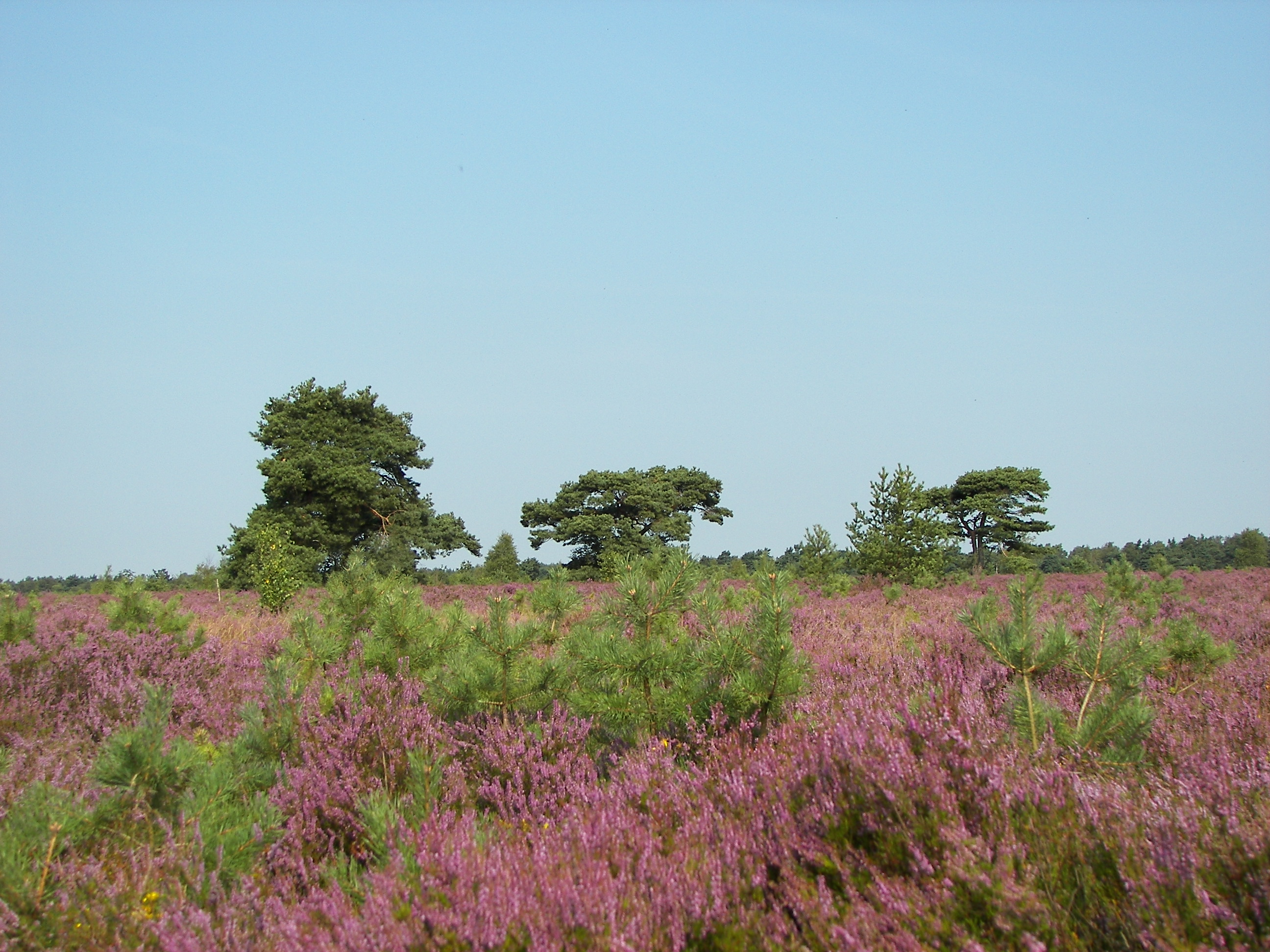 Osterheide bei Schneverdingen